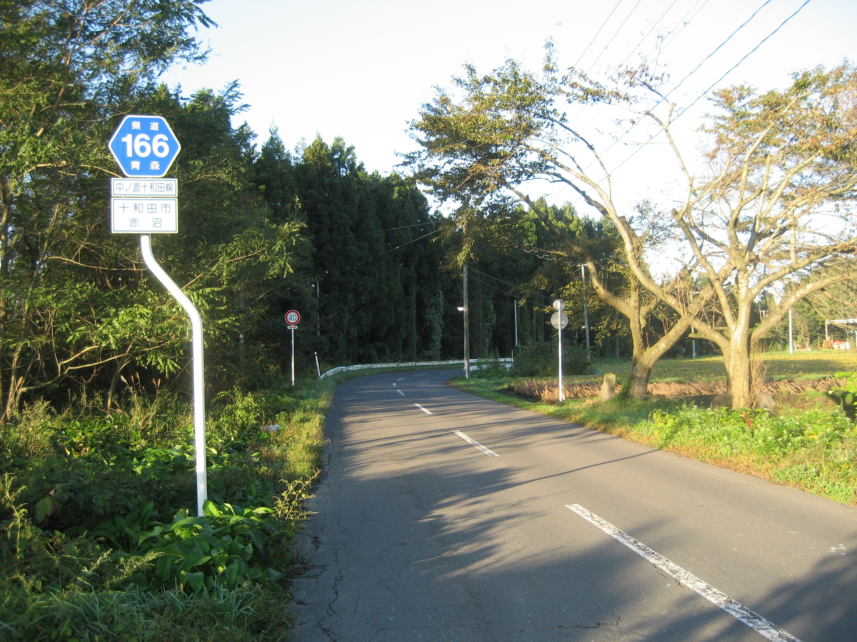 青森県道166号線十和田市赤沼付近